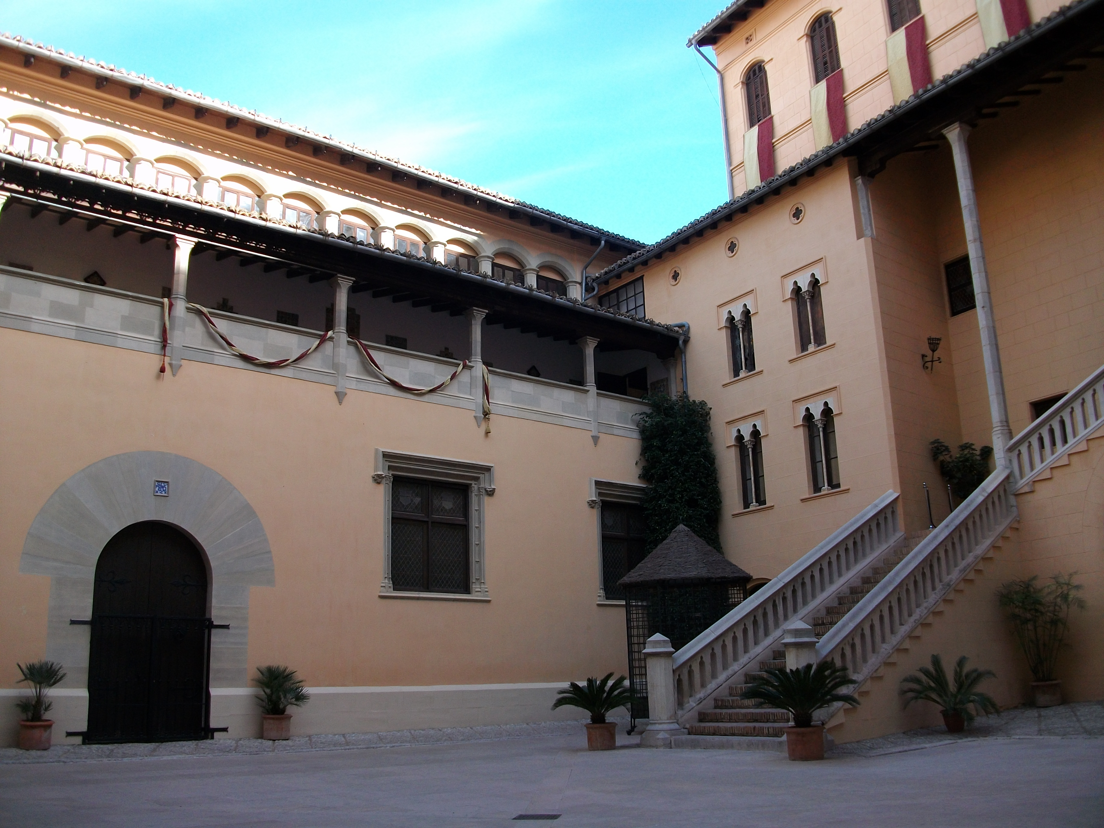 Vista del pati del Palau Ducal de Gandia, la Safor, País Valencià.